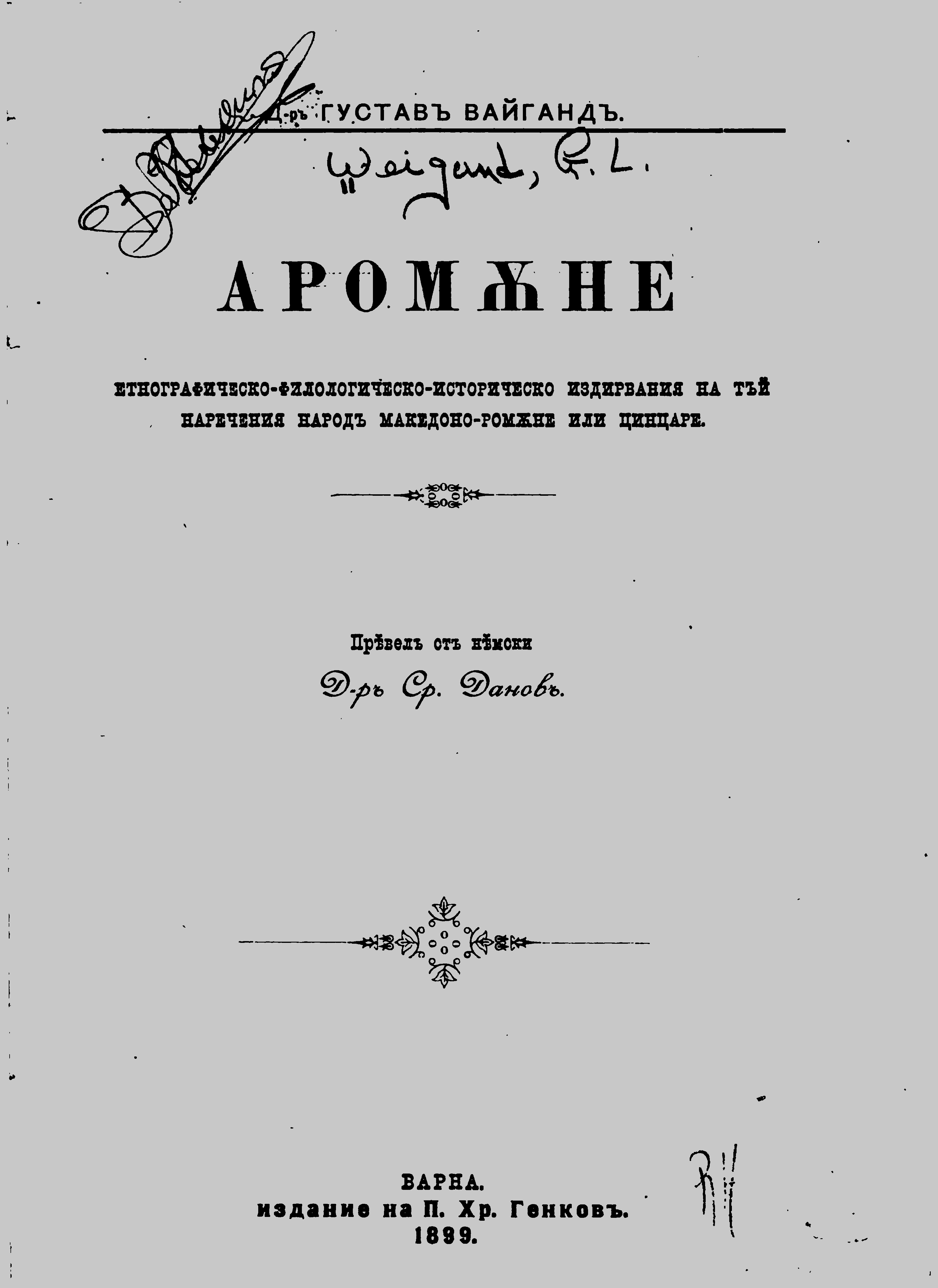 Aromanians